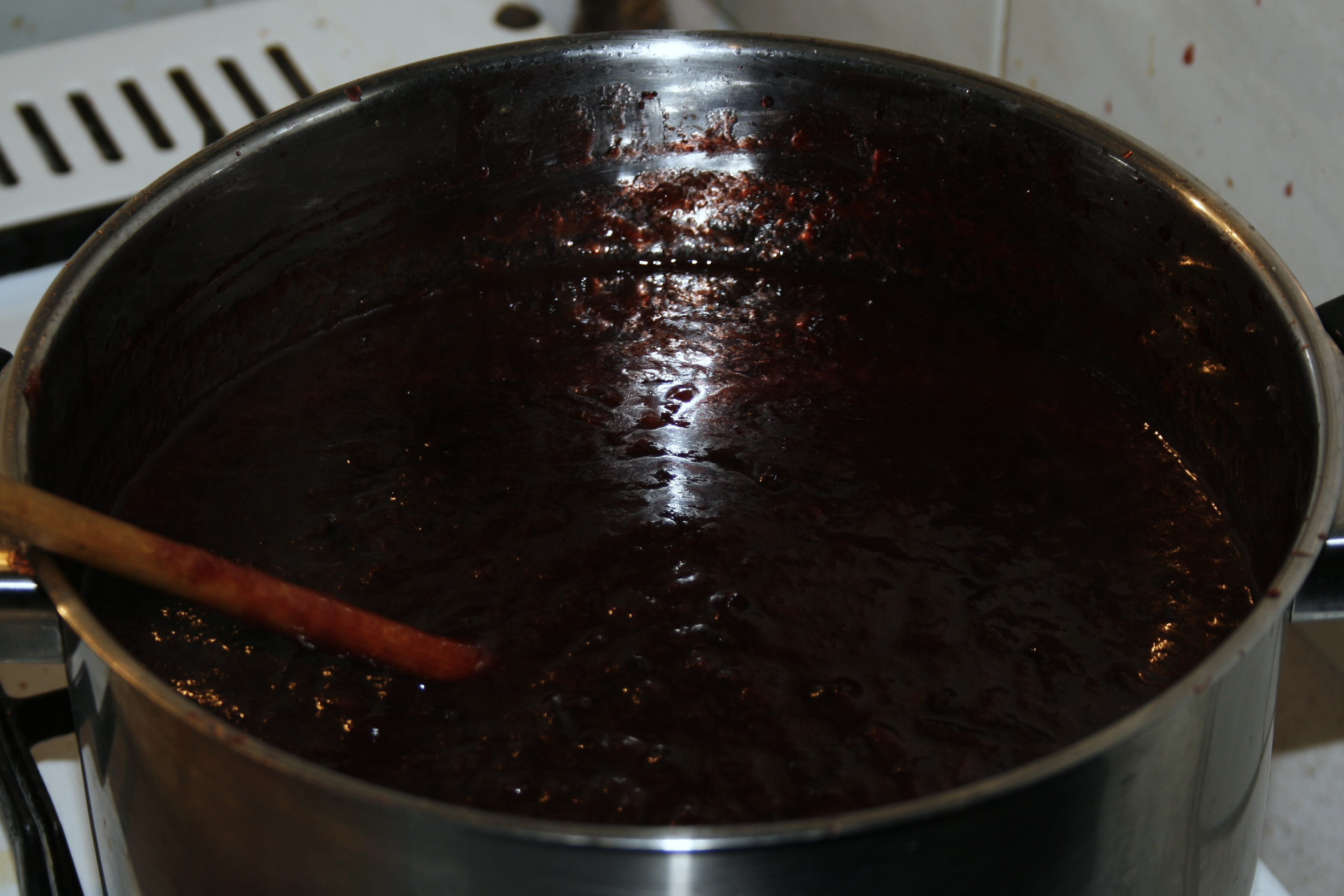 Hmotu je nutno promíchat po celém obvodu nádoby. Pravá Švestková povidla jsou pouze jednodruhová. Povidla doslazujeme pouze podle kvality švestek (cukernatosti). Nejčastější druh švestky podle názvu stromu Pravá švestka.